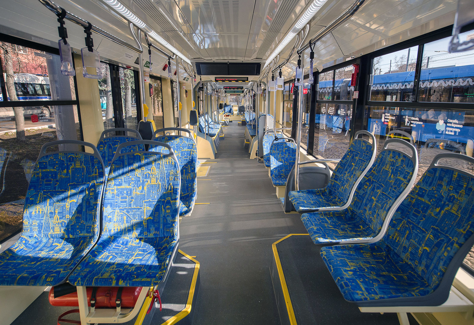 Салон передней секции трамвая 71-931М («Витязь-М»). Вид назад